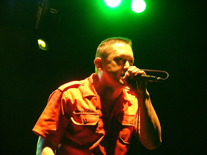 Fermin Muguruza, Komunikazioa Tour, AFE. Montevideo.Fermin Muguruza en Montevideo